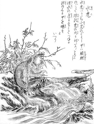 Suiko (水虎) from the Konjaku Gazu Zoku Hyakki (今昔画図続百鬼)